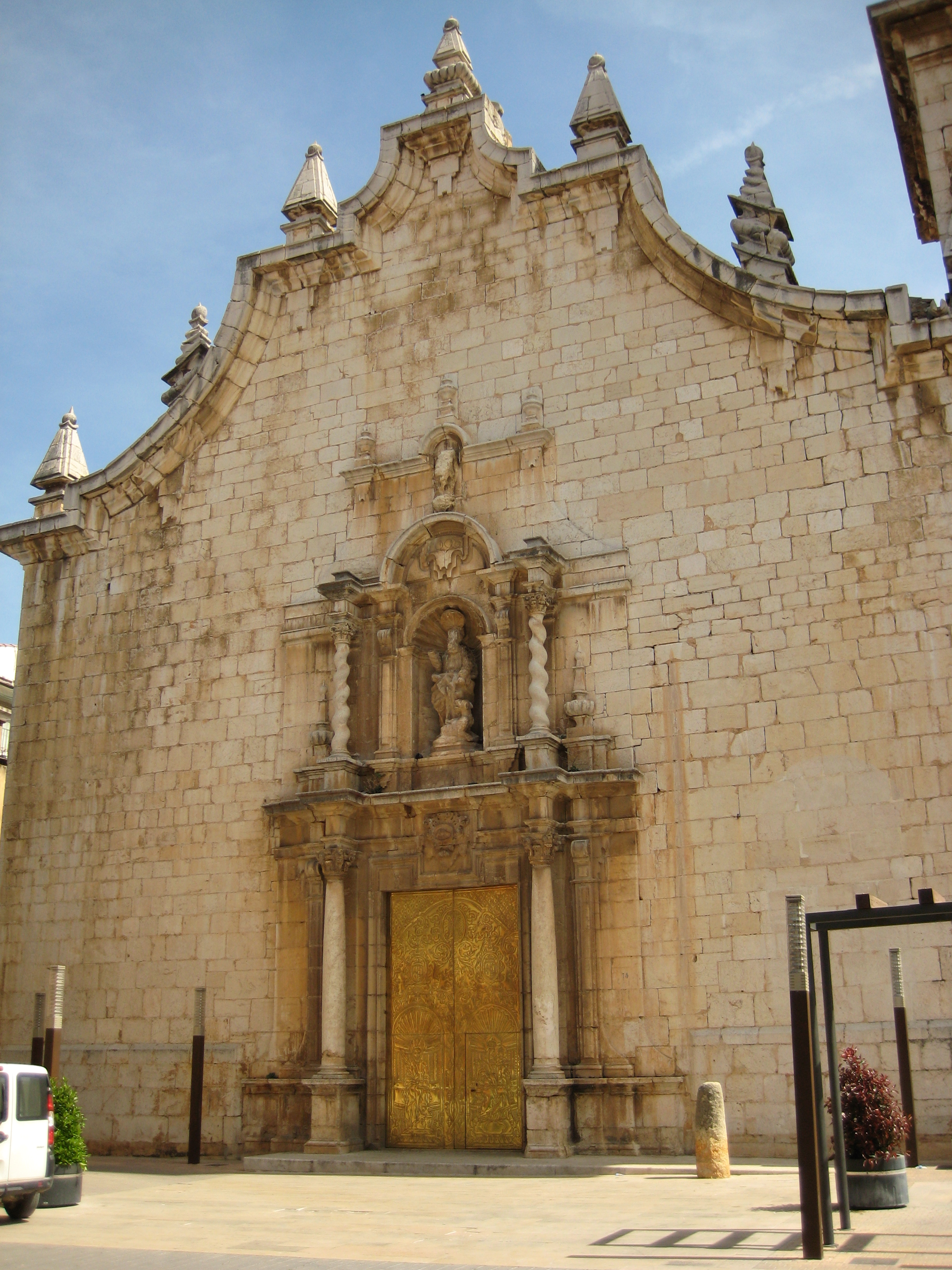 Façana principal de l'església de San Bartomeu de la Jana (Baix Maestrat)